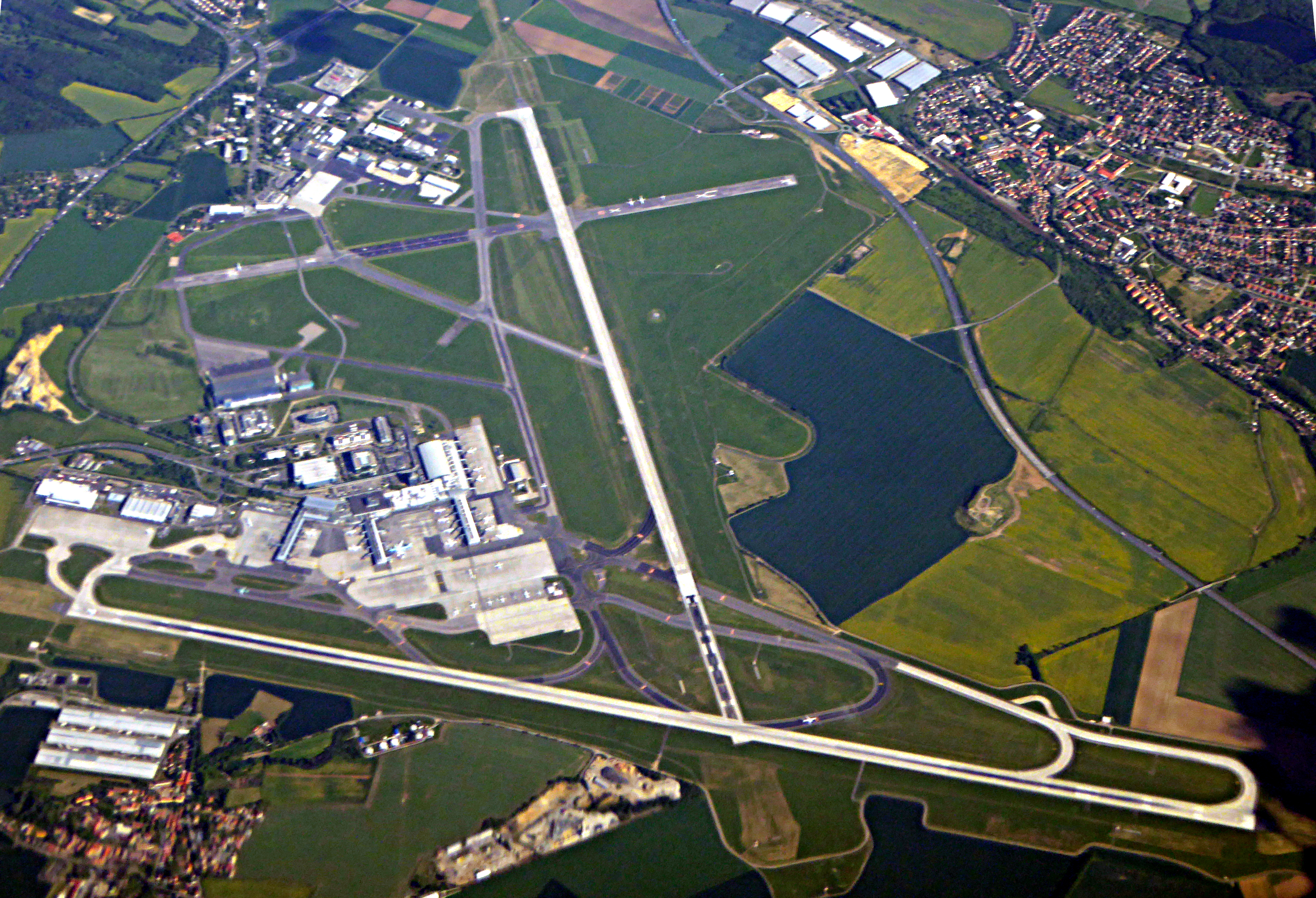 Der Prager Václav-Havel-Flughafen (Ruzyně) aus der Luft von Nordwesten gesehen.